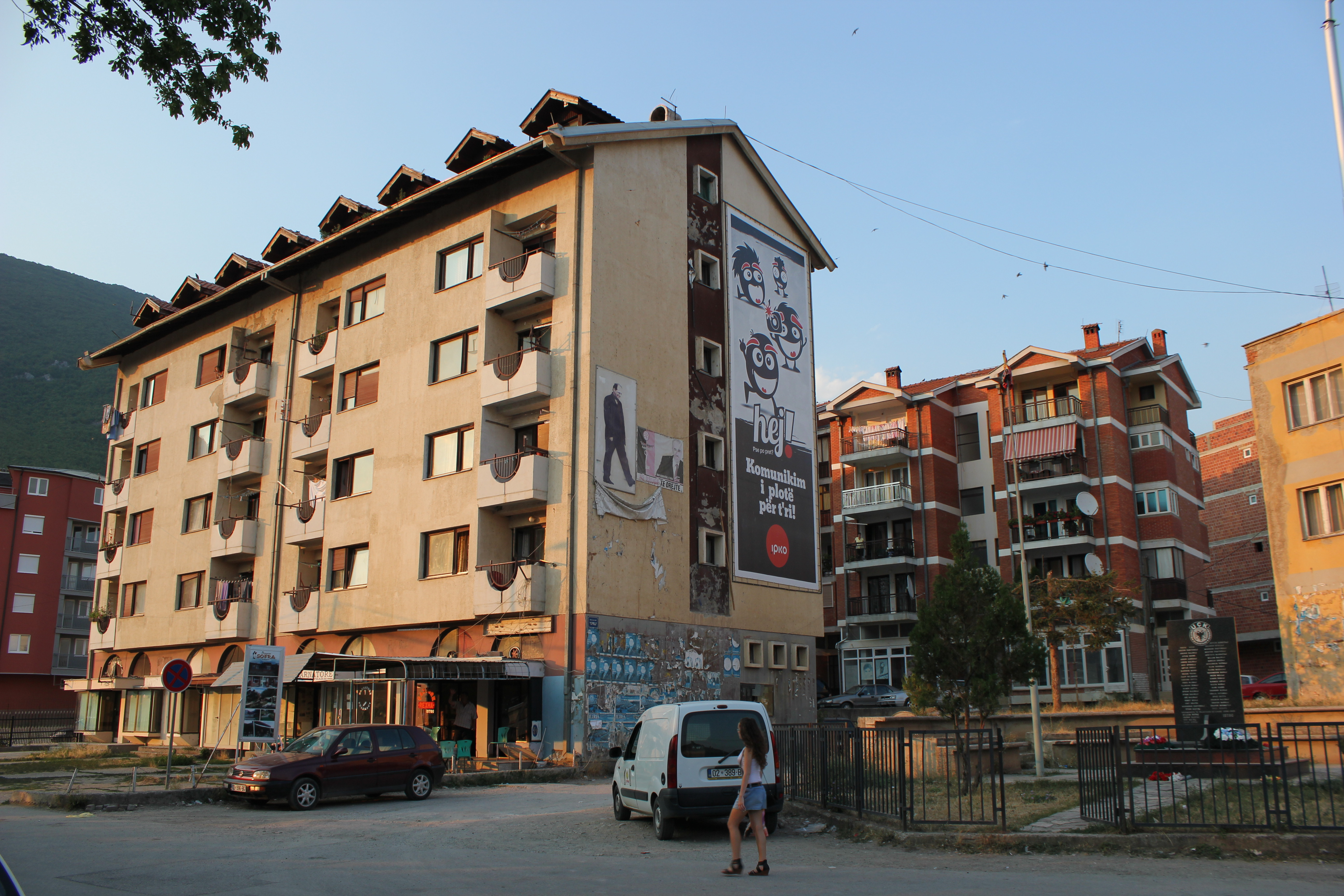 Pamje nga qyteti i Istogut